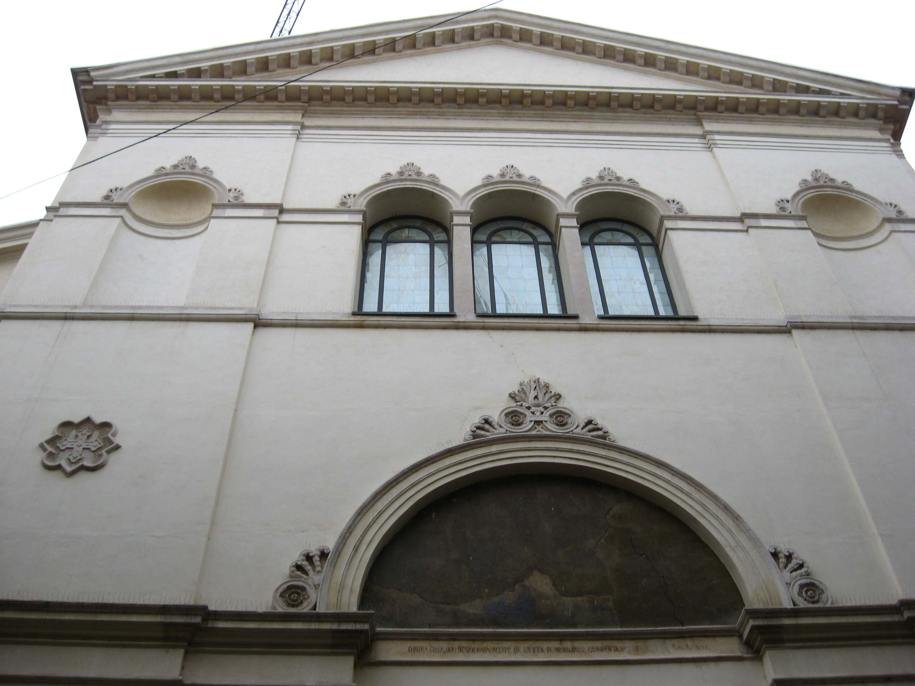 Chiesa S. Andrea Padova